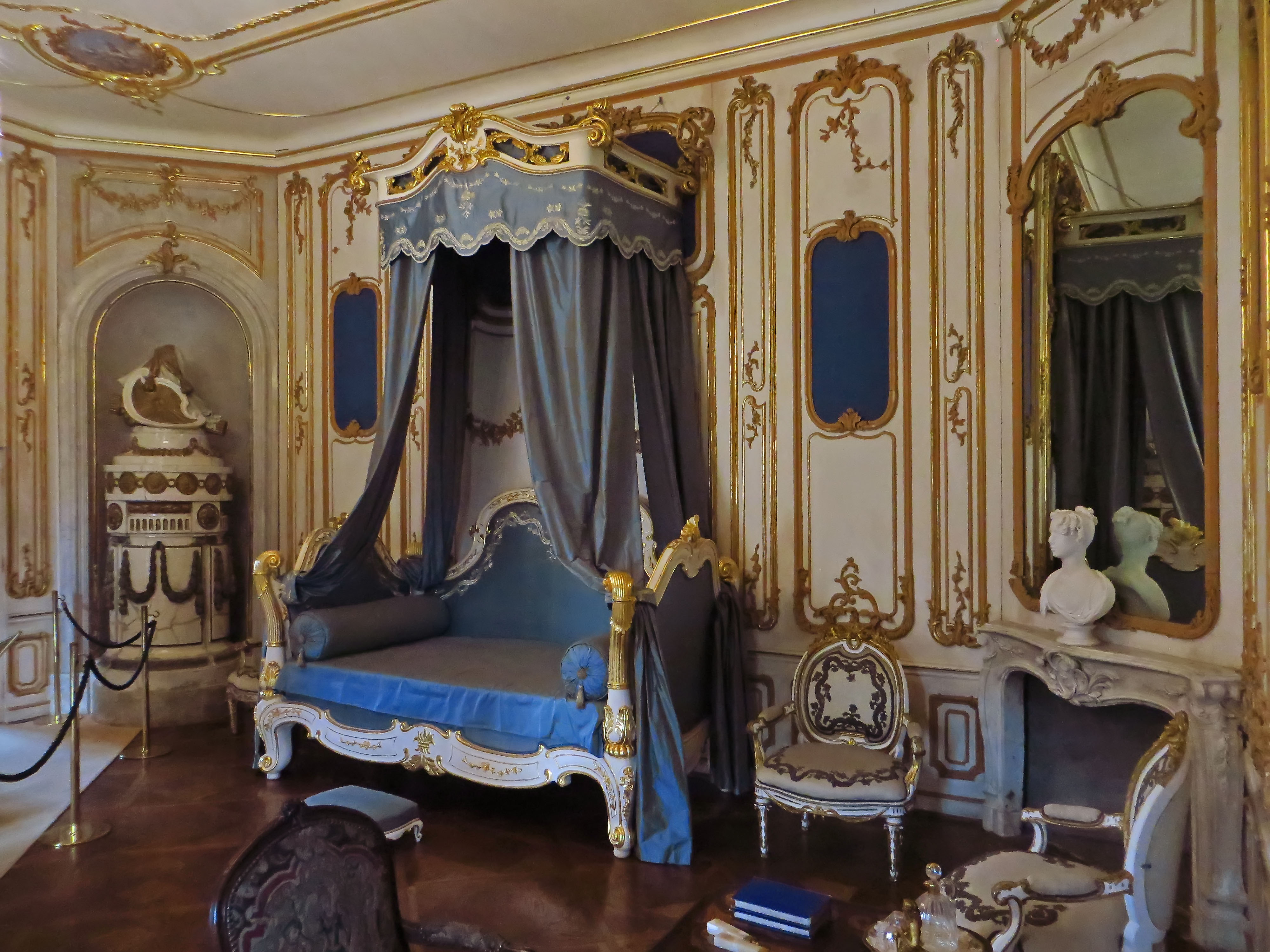 Esterházy-kastély – kastély This is a photo of a monument in Hungary, Identifier: 4051